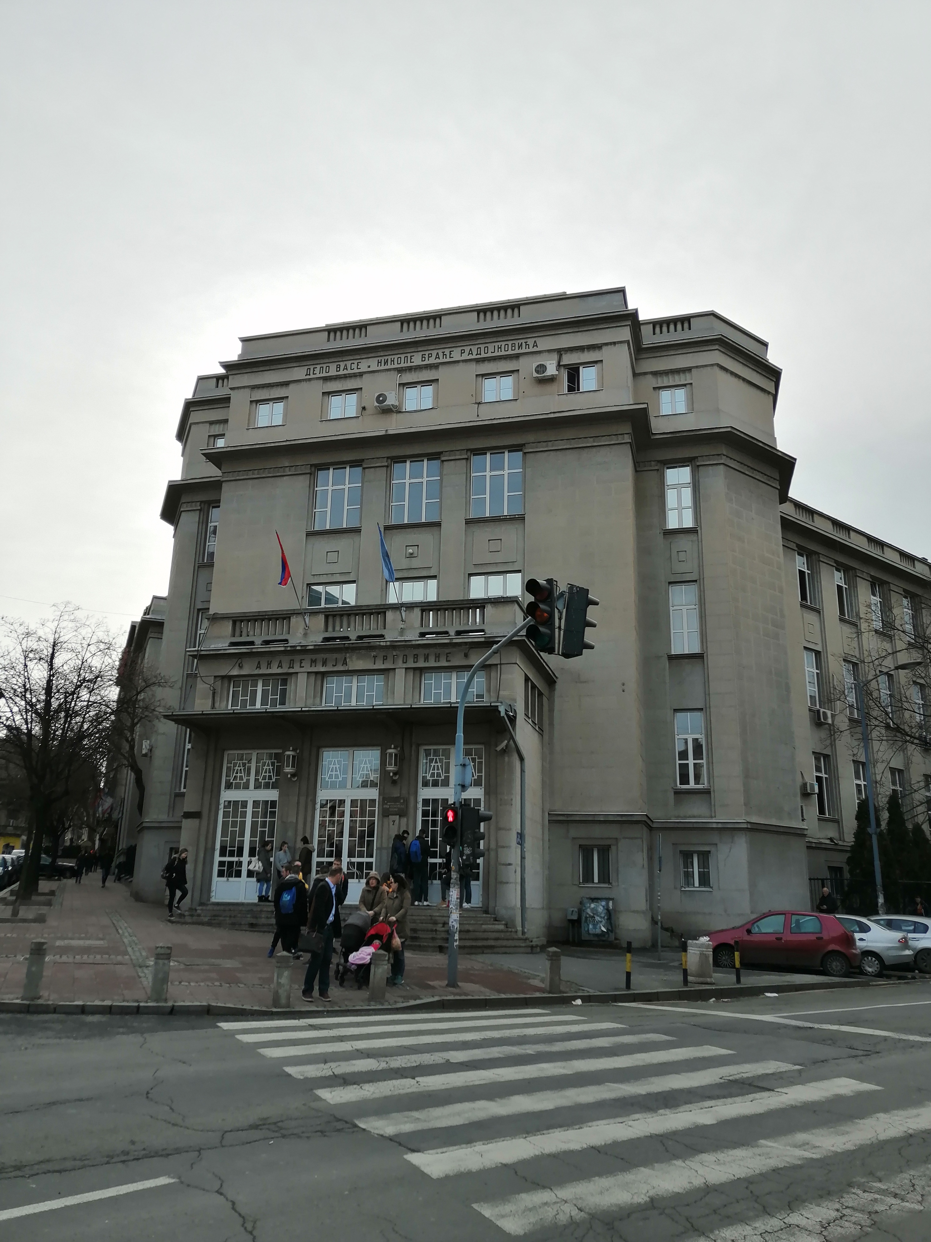 Prva ekonomska škola Beograd